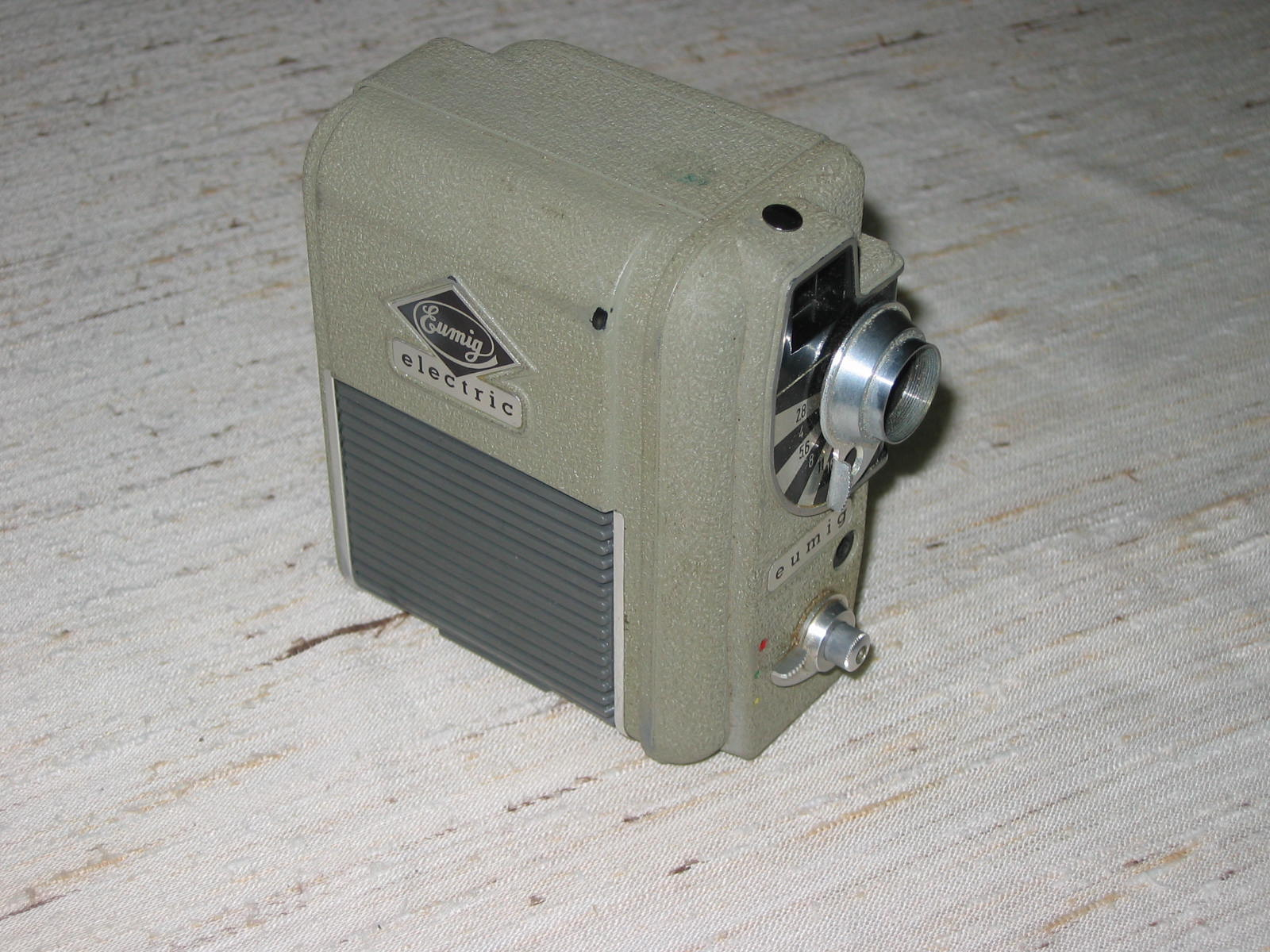 Eumig 8 mm movie camera (about 1955) Picture : Gérard Delafond